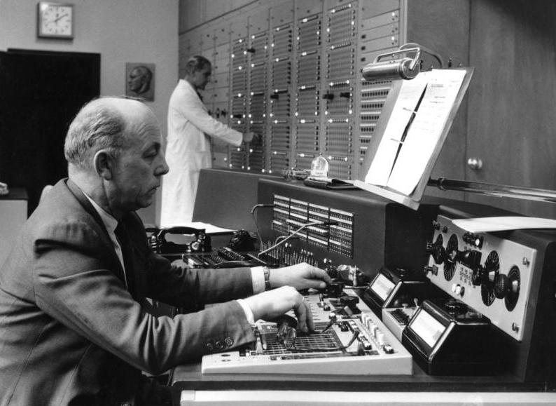 Funkhaus Köln: Hauptschaltraum des Senders, wo die sogenannte "Mittelwelle" gesteuert und kontrolliert wird. Der Hauptschaltraum wird auch das "Nervenzentrum" oder " Kommandobrücke" genannt. Toningenieure Weber und Bücking (im Hindergrund) während der Arbeit.